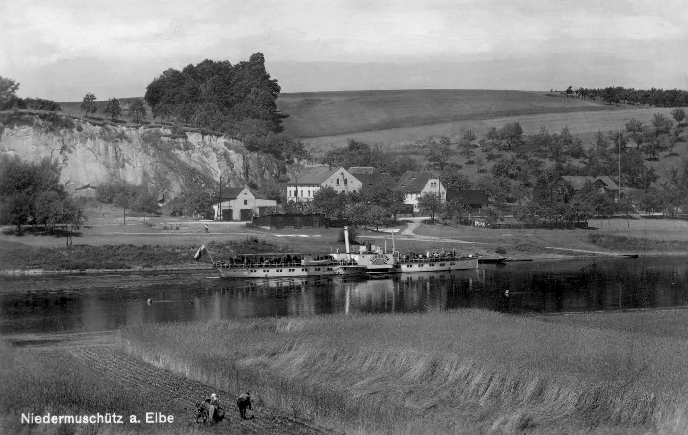 Niedermuschütz; Blick auf Niedermuschütz mit Dampfer Lobositz This postcard is from publisher Brück & Sohn in Meißen ( postcard has a unique number 26155 and is available in a higher resolution at the publisher. This images was uploaded in a cooperation project between Wikipedians and the publisher.